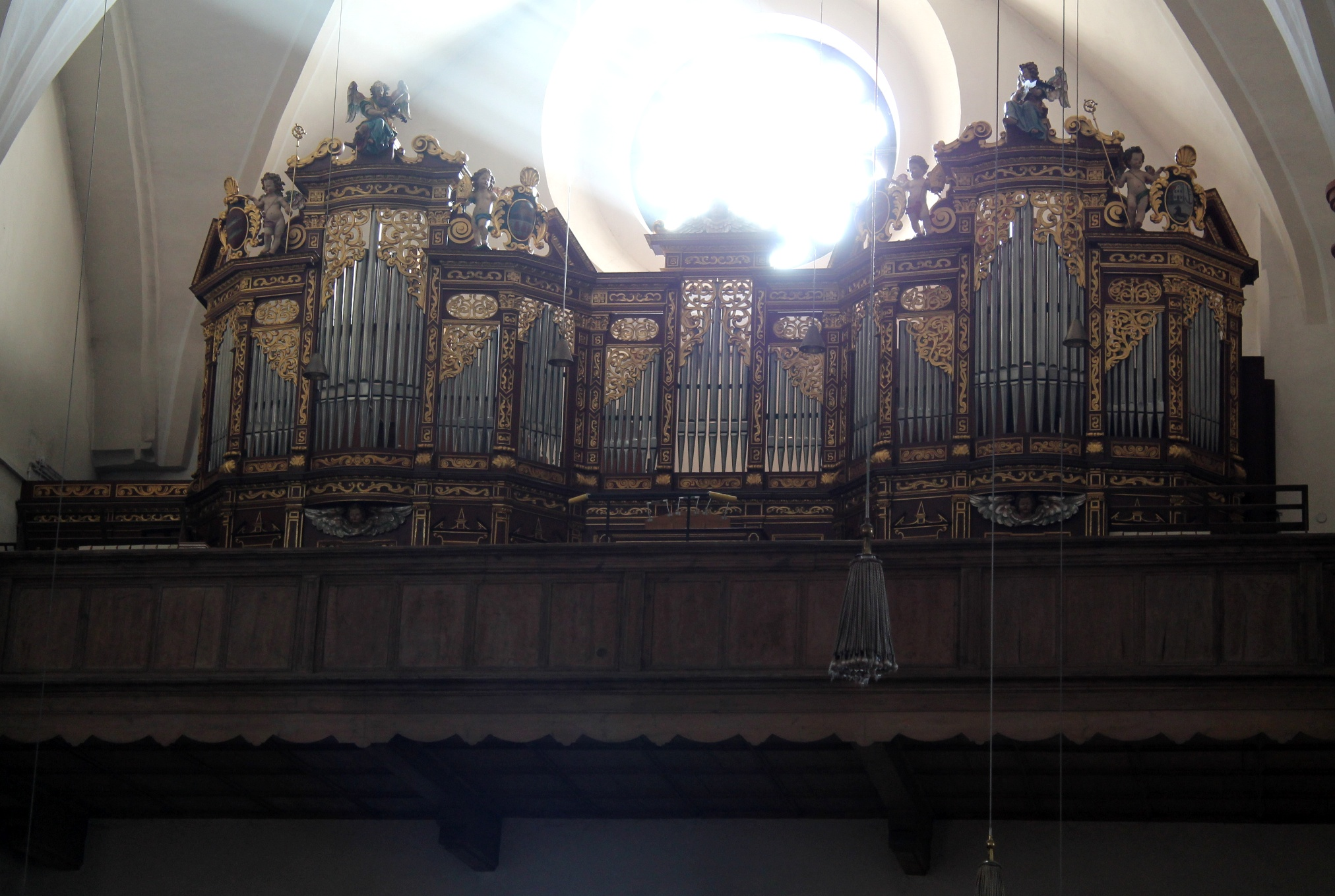 Orgel von St. Zeno in Bad Reichenhall (1899, F.B. Maerz, II/23)